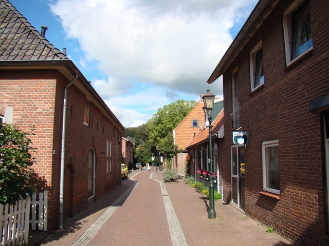 Gaststraat Bredevoort